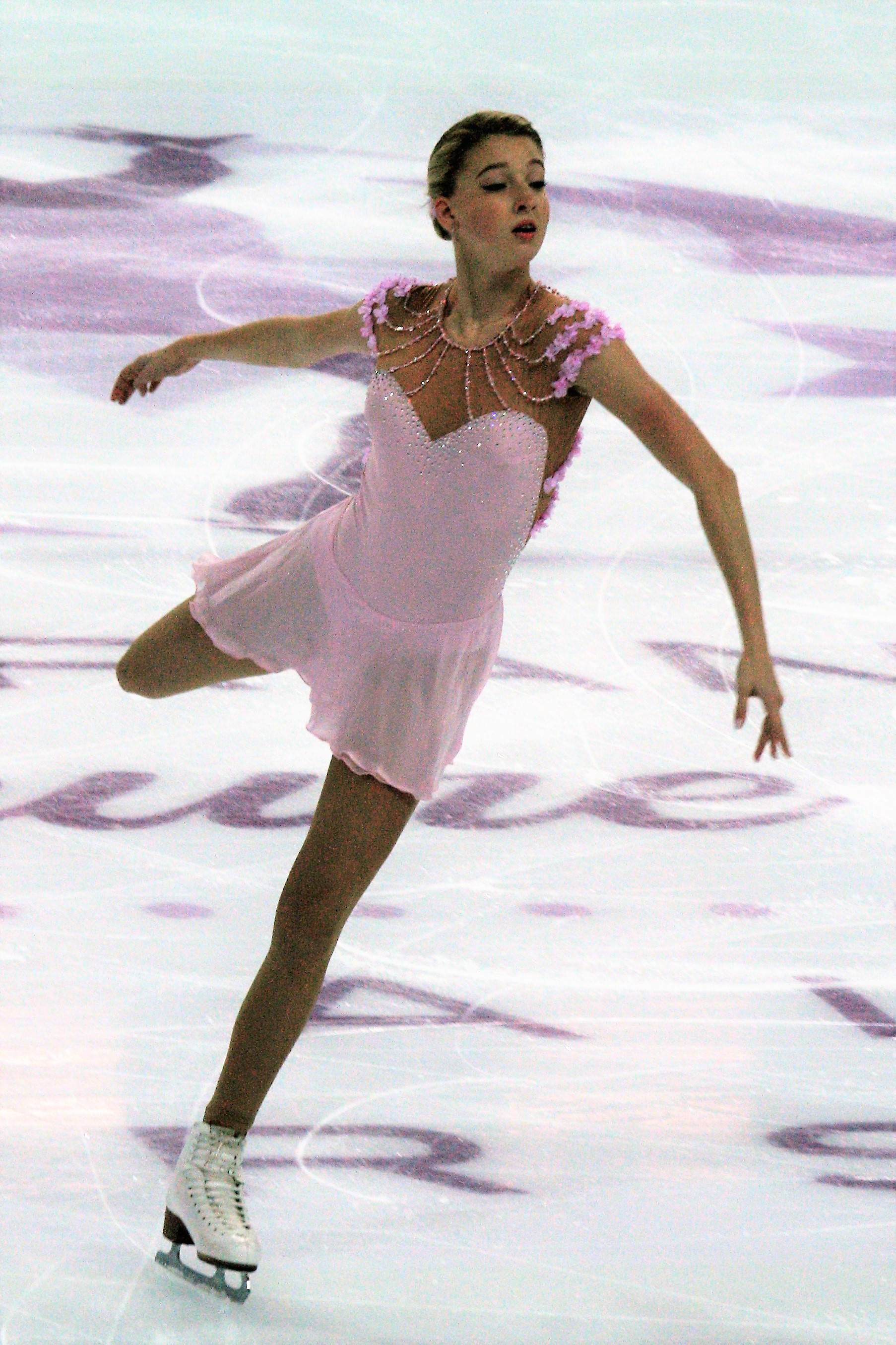 Мария Соцкова (Россия) на финале Гран-при по фигурному катанию 2016-2017